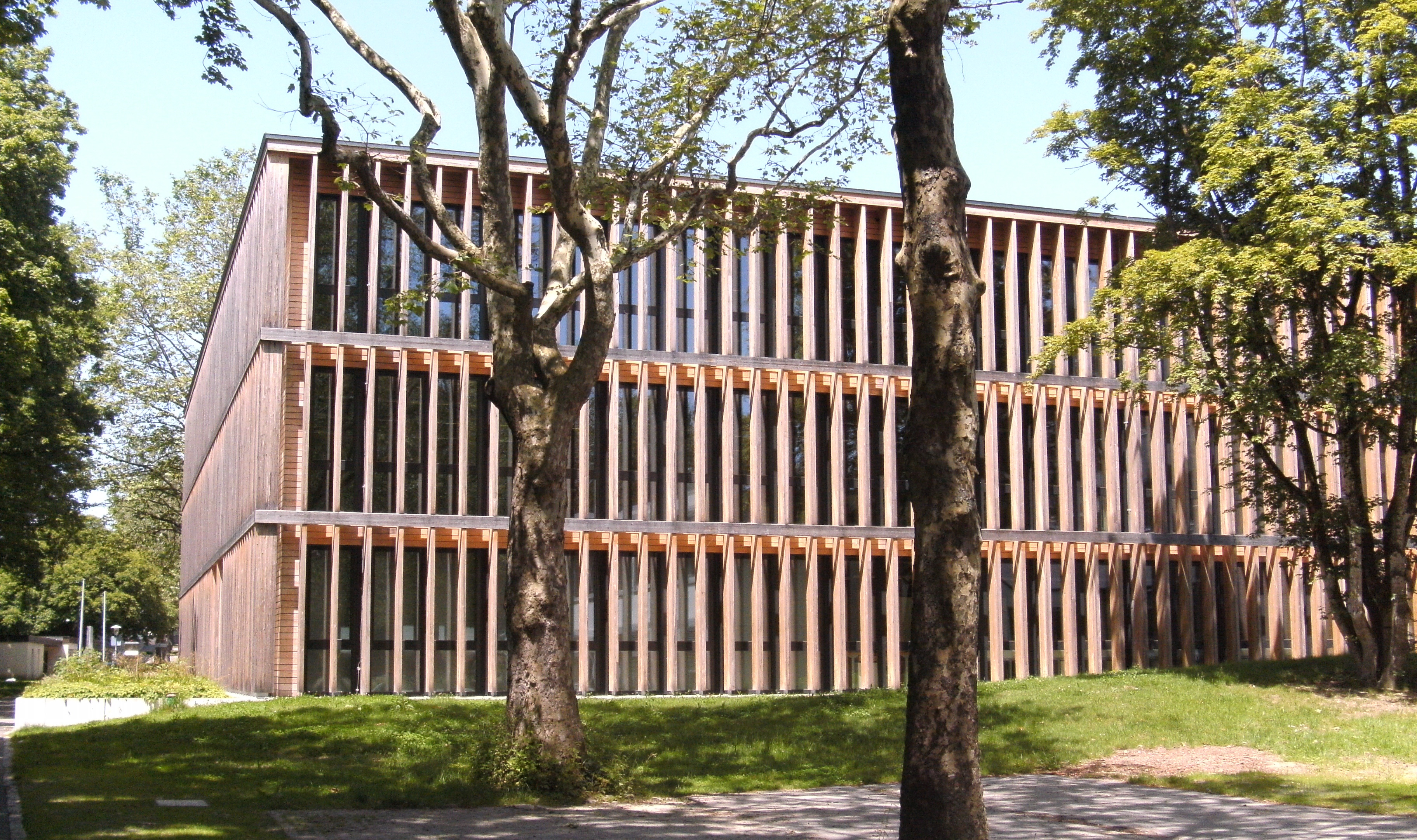 C-Bau, auch Neubau genannt, des Rupert-Neß-Gymnasiums in Wangen im Allgäu